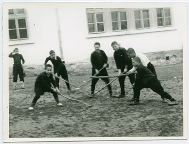 Снимка на играта „свинка (бишка)“, в която едно момче се стреми да вкара камък (пънче или топка) с тояга в малко трапче. Останалите му пречат, като същевременно пазят своите трапчета, за да не попадне камъчето в тях.